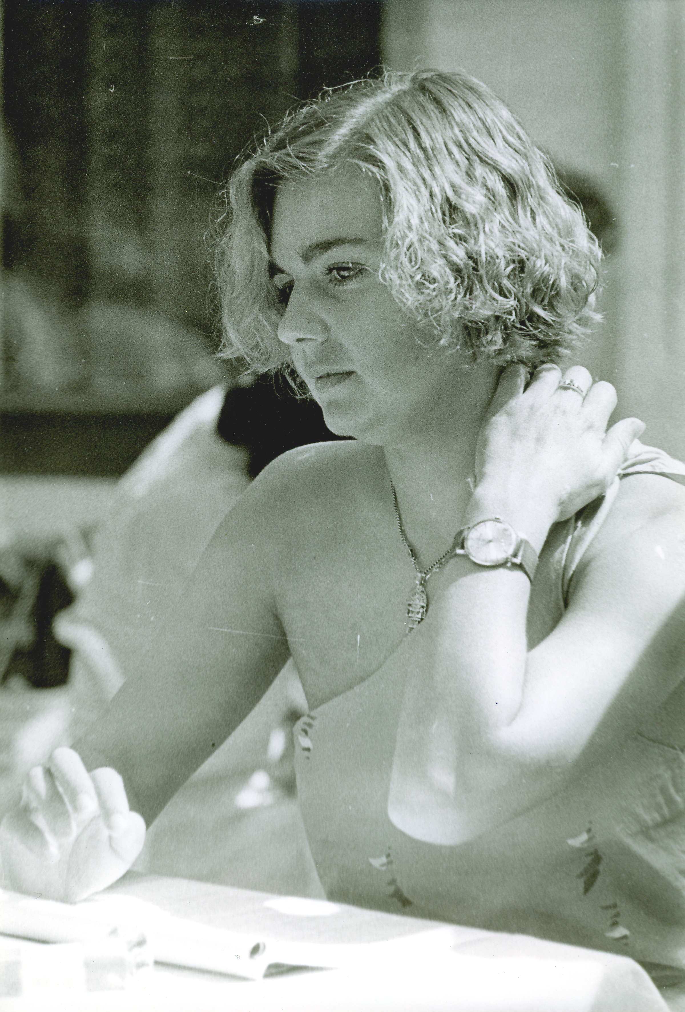 Hrvatska glumica Vitomira Lončar na Filmskim susretima u Nišu 1984. godine